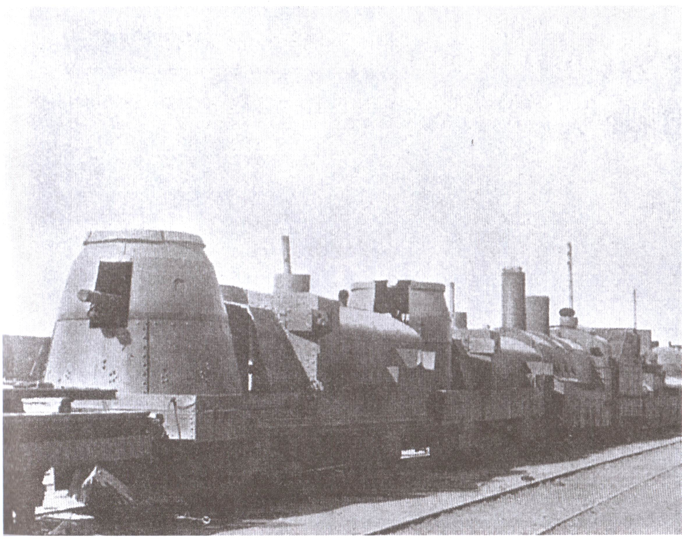 Бронепоезд, отбитый белыми у болшевиков